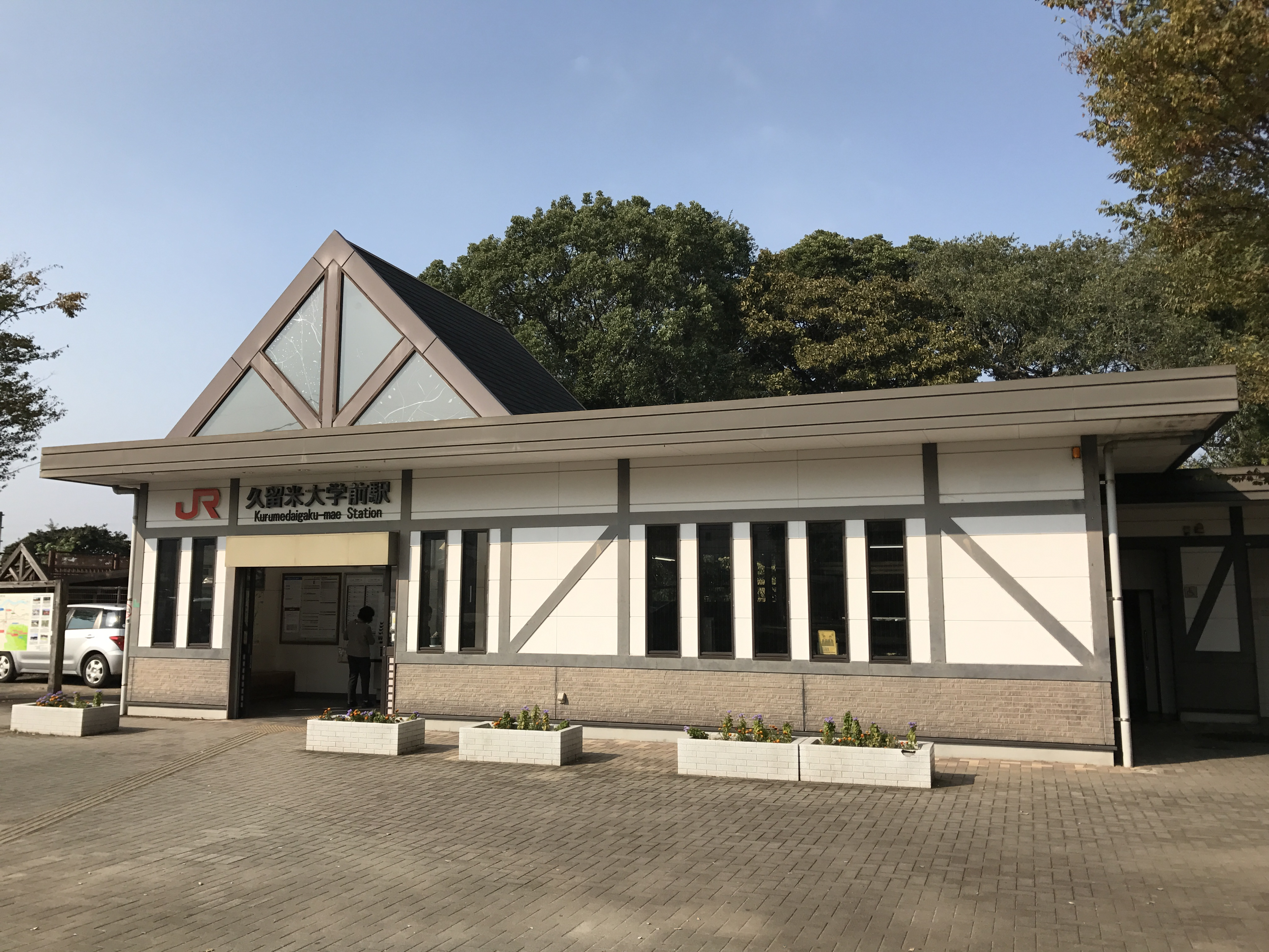 久留米大学前駅駅舎